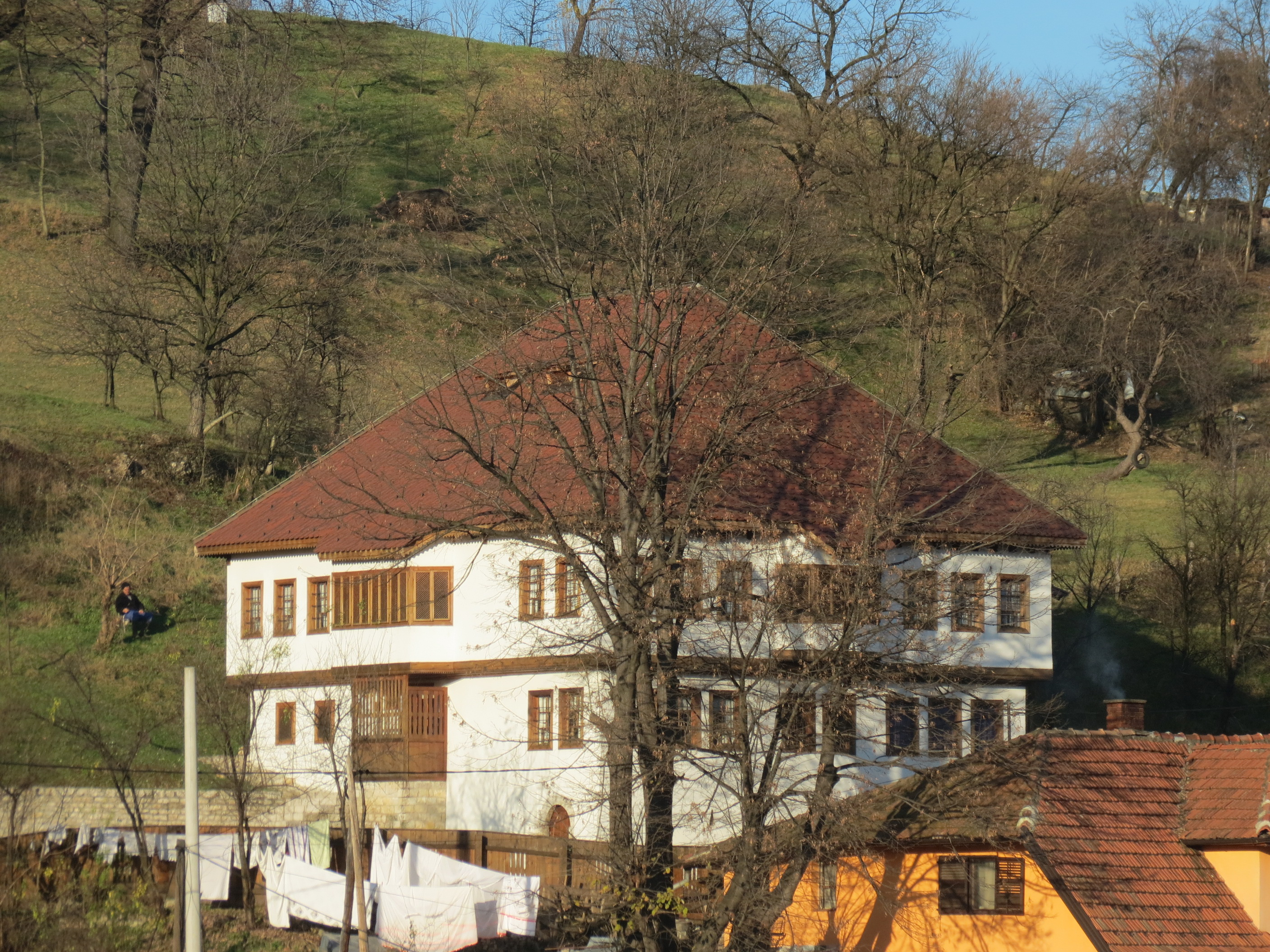 Tešanj